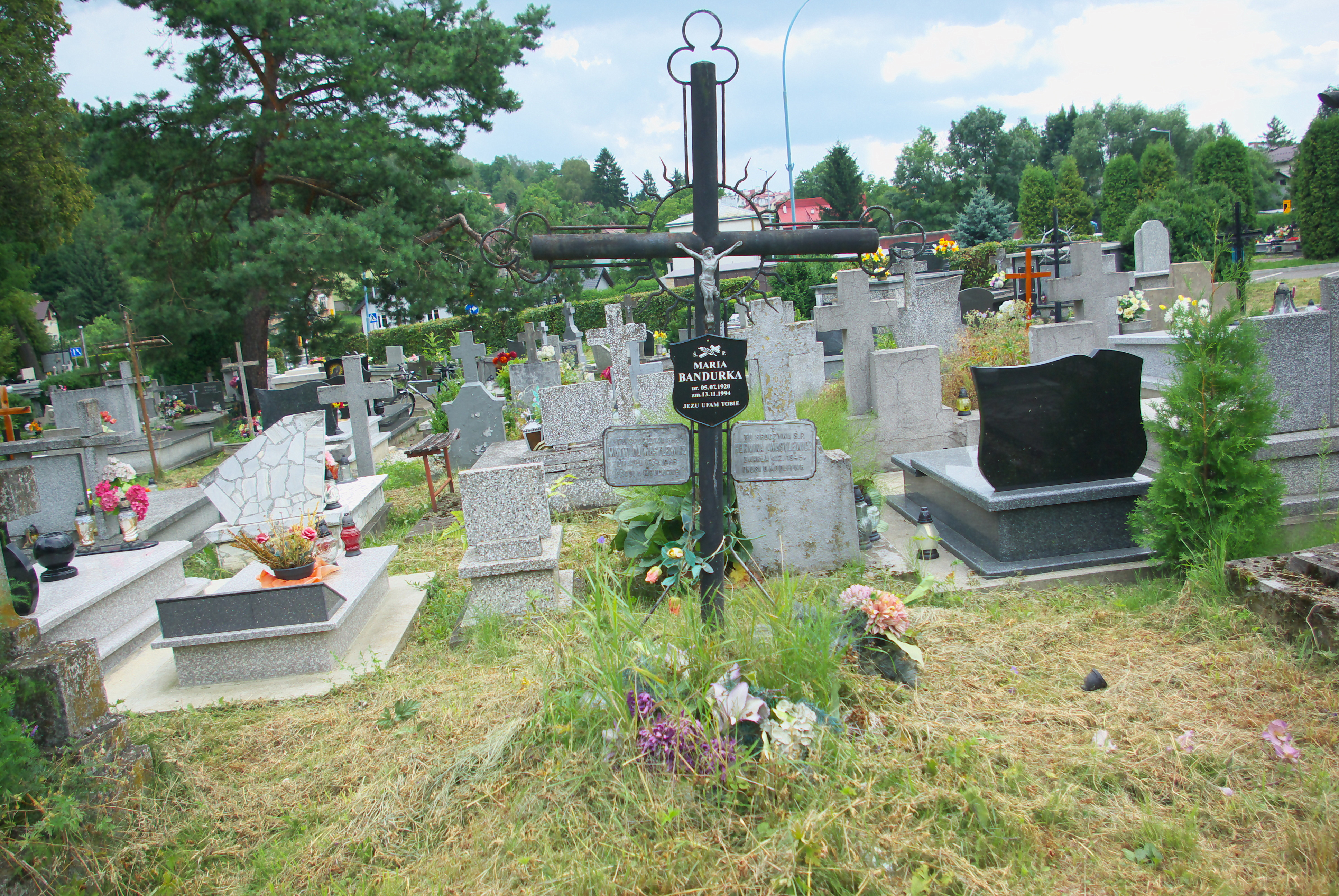 Grób rodzinny Herminy i Matyldy Wasylewicz oraz Marii Bandurki na Cmentarzu Centralnym w Sanoku.